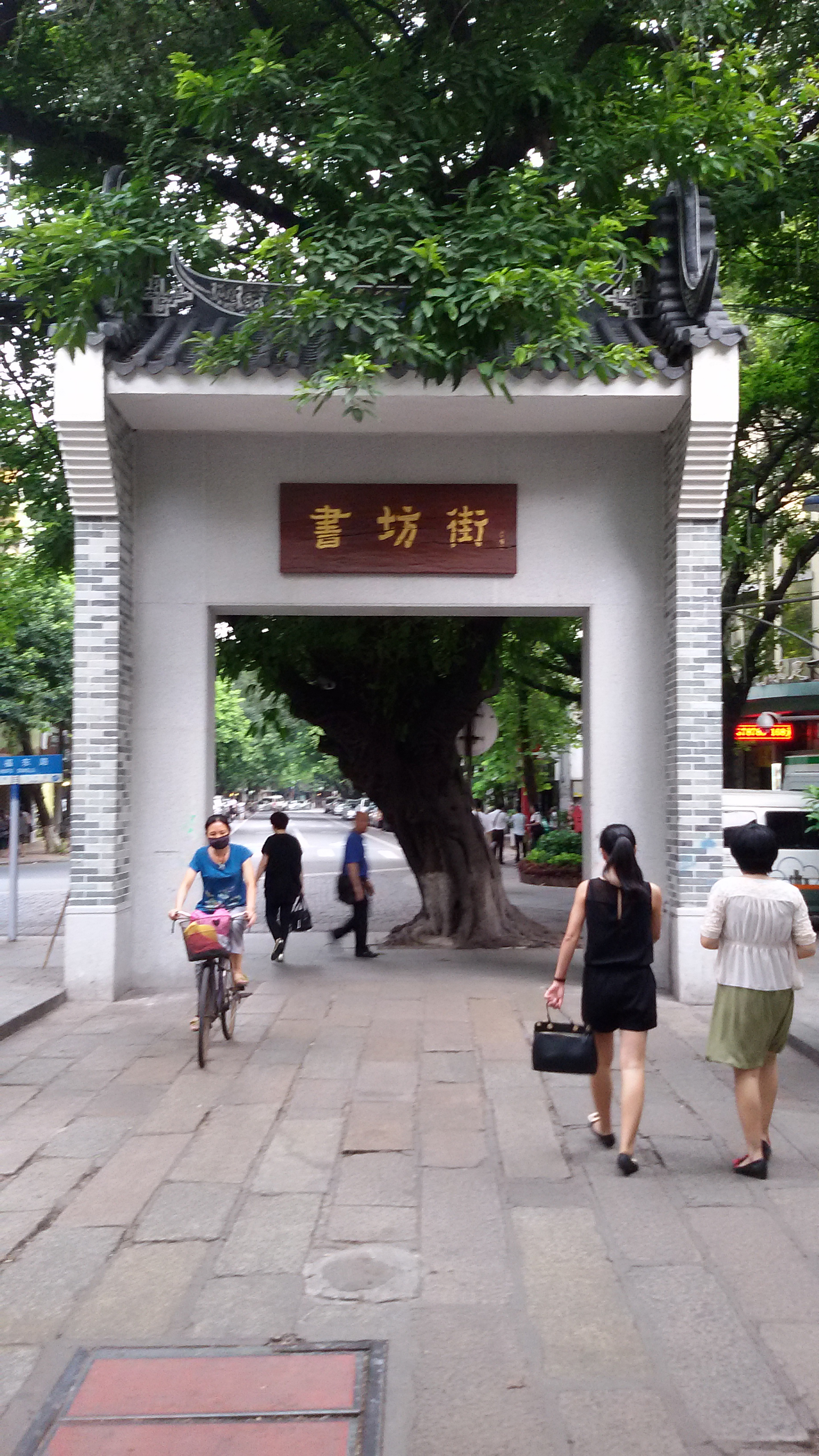 粵語: 書坊街